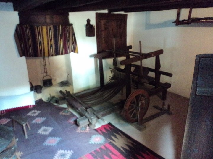 Гайтанджийницата в националния музей "Васил Левски", Карлово.